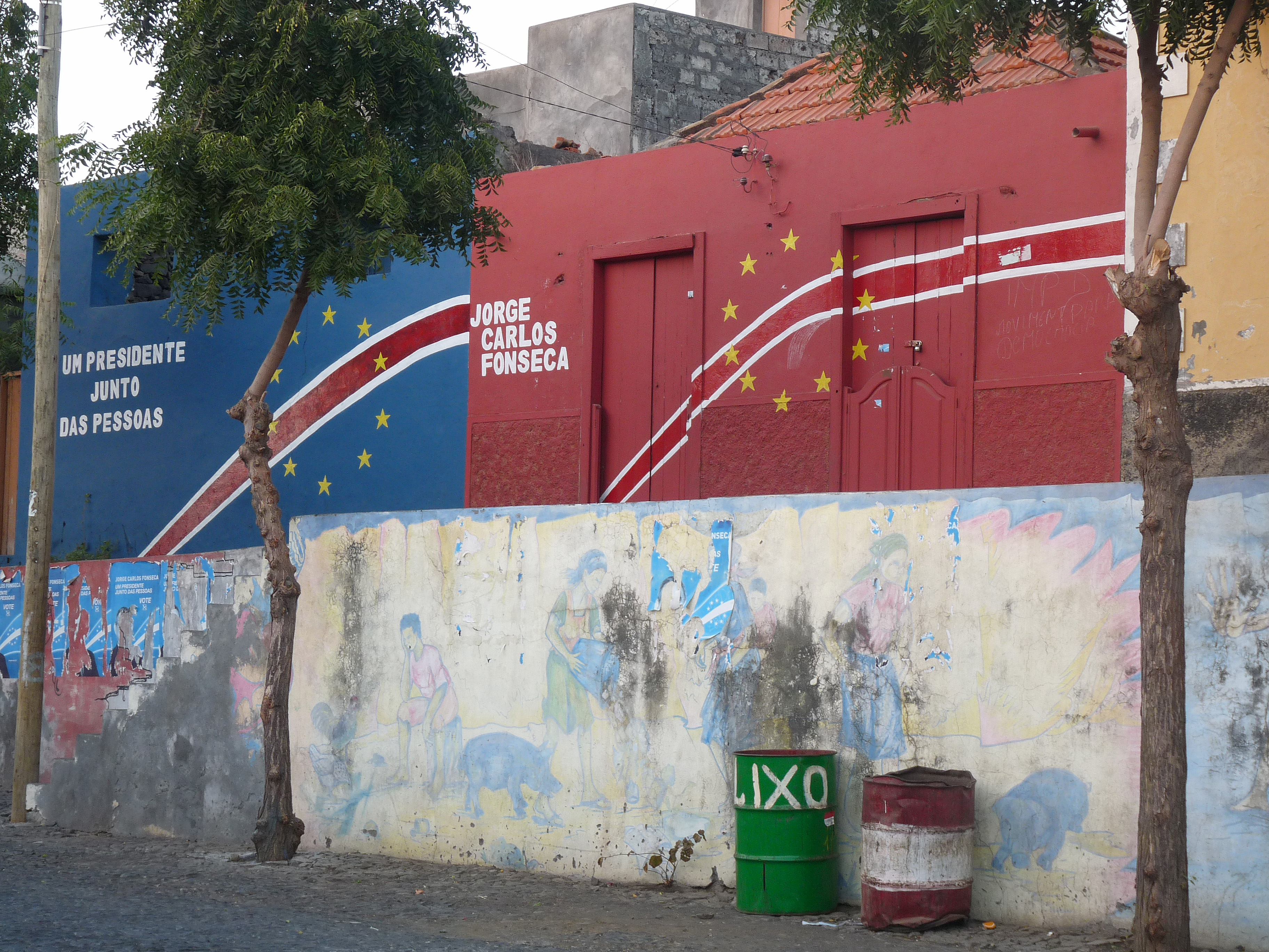 Campagne électorale sur les murs de São Filipe (île de Fogo, Cap-Vert) : soutien à Jorge Carlos Fonseca, président du Cap-Vert depuis 2011